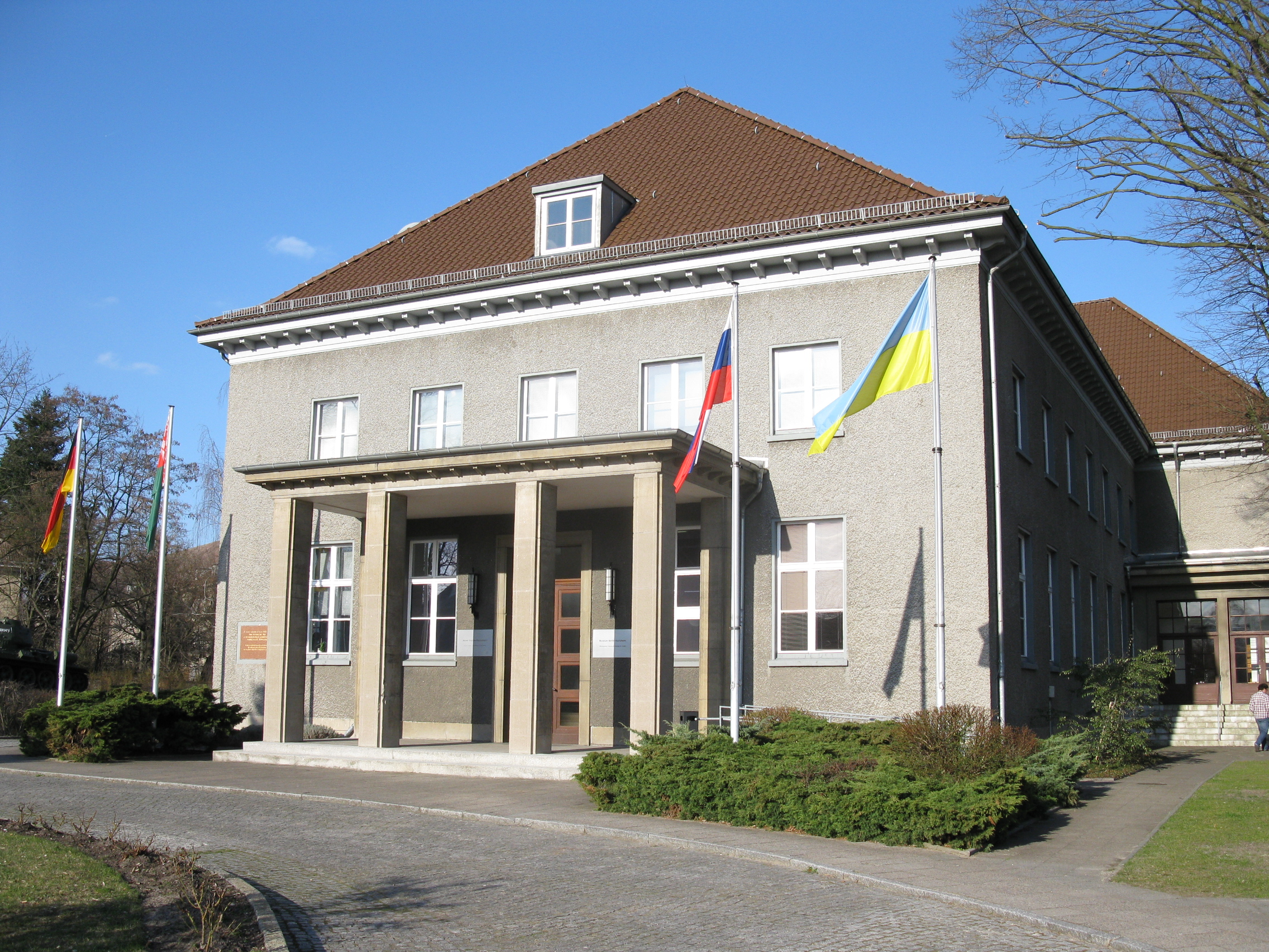 Berlin-Karlshorst, Deutsch-Russisches Museum